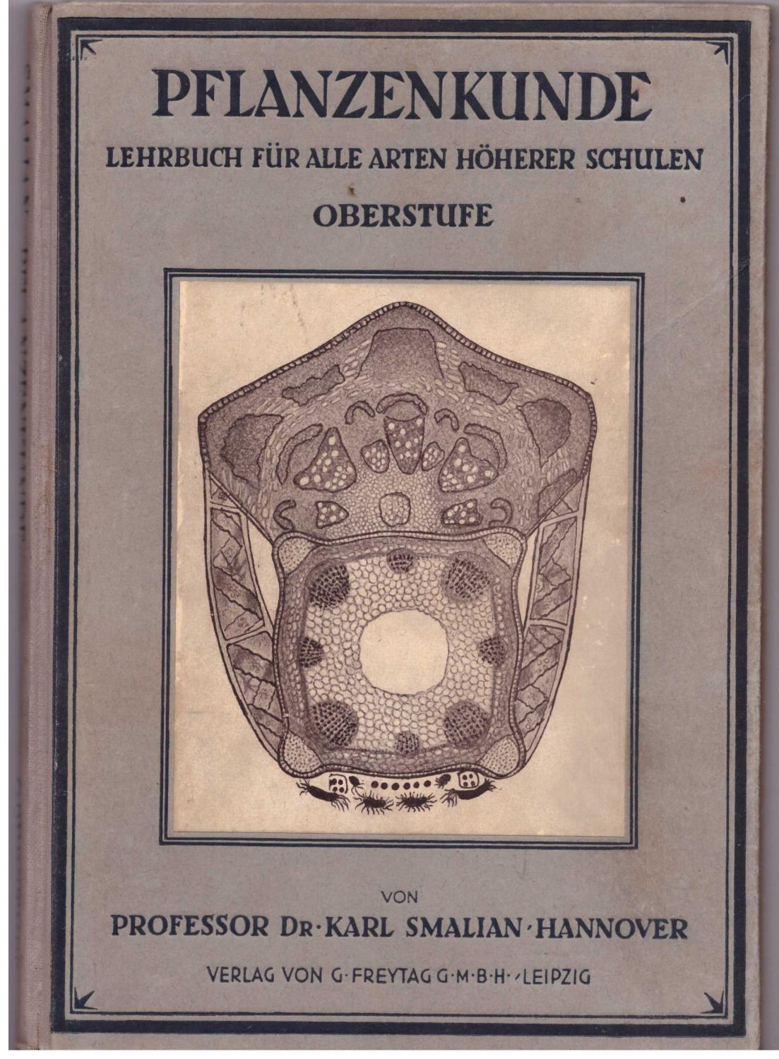 Vorderseite des Buchdeckels der in Halbleinen gebundenen Schrift „Pflanzenkunde. Lehrbuch für alle Arten Höherer Schulen von Professor Dr. Karl Smalian, Hannover Verlag von G. Freytag G.M-B.H, Leipzig“ ...